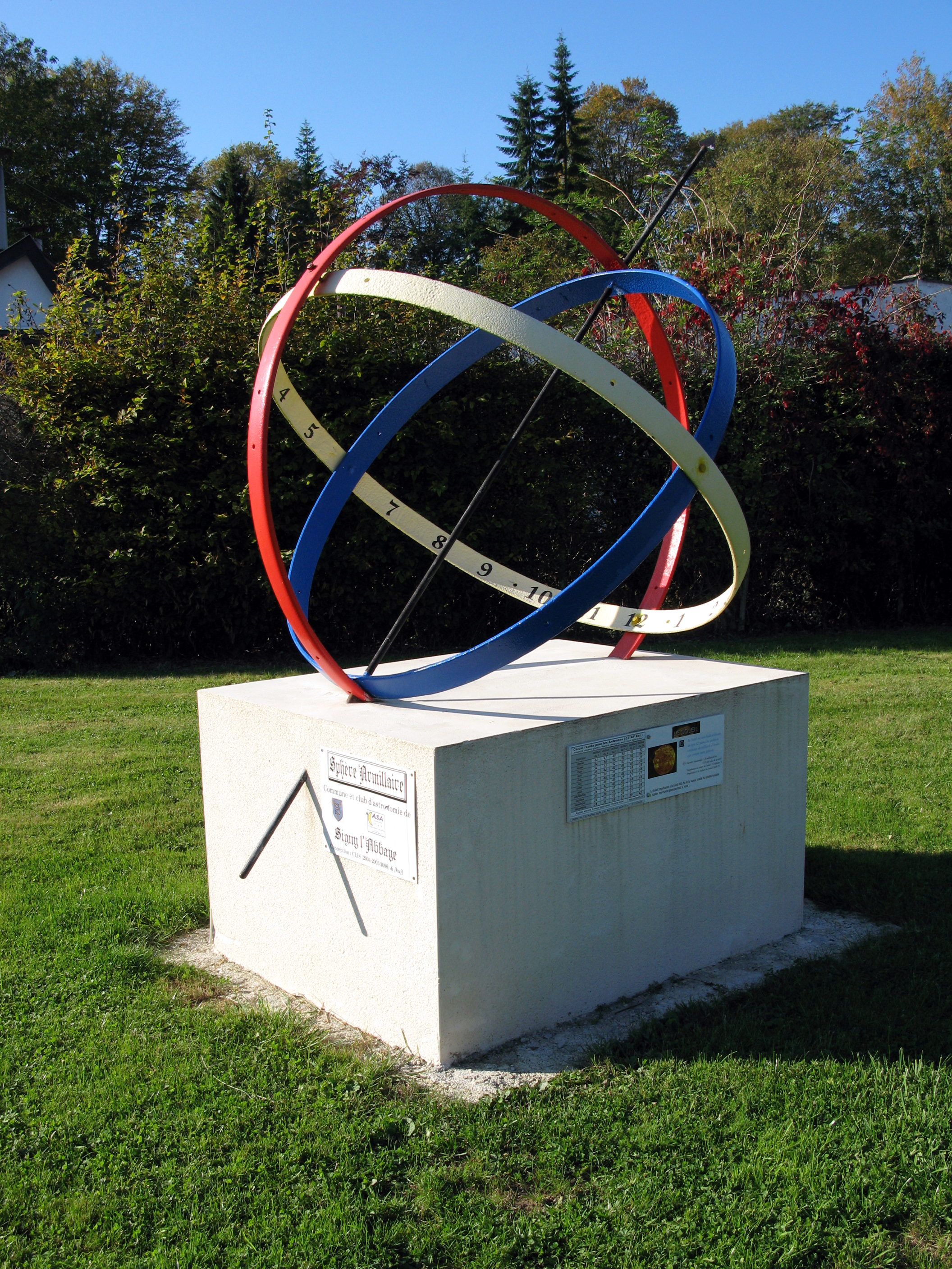 Signy-l'Abbaye (Ardennes, France) - Le cadran solaire ou "sphère armillaire".